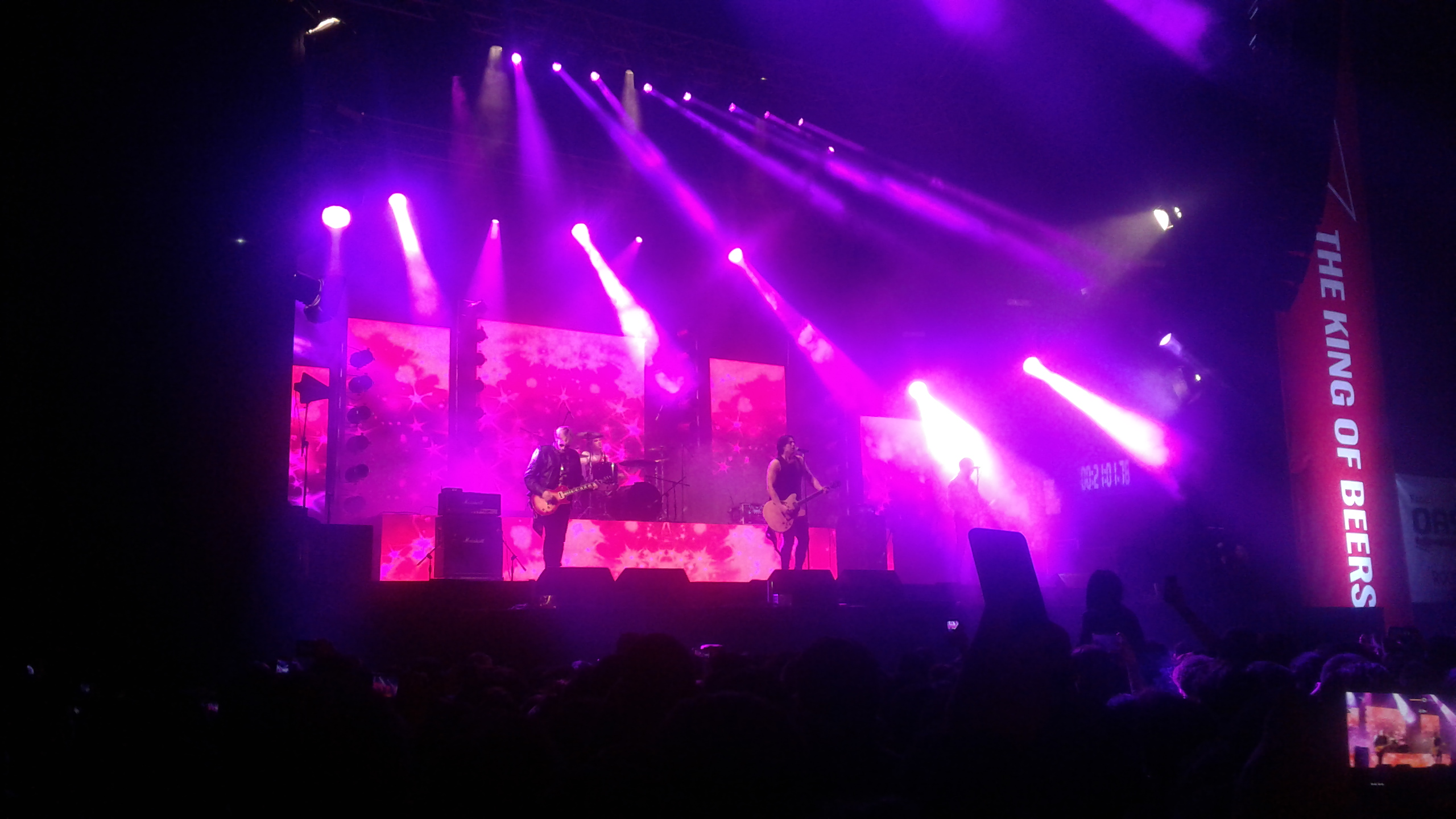 Banda de rock Zen en un concierto en vivo.